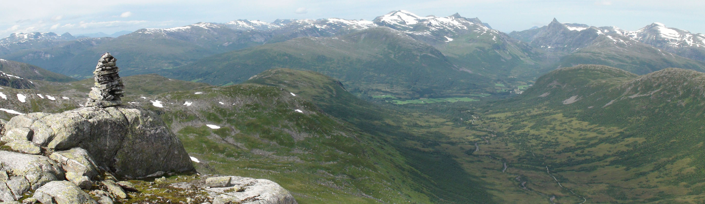 Utsikt fra Kragefjellet mot Knutsdalen og Hornindal.